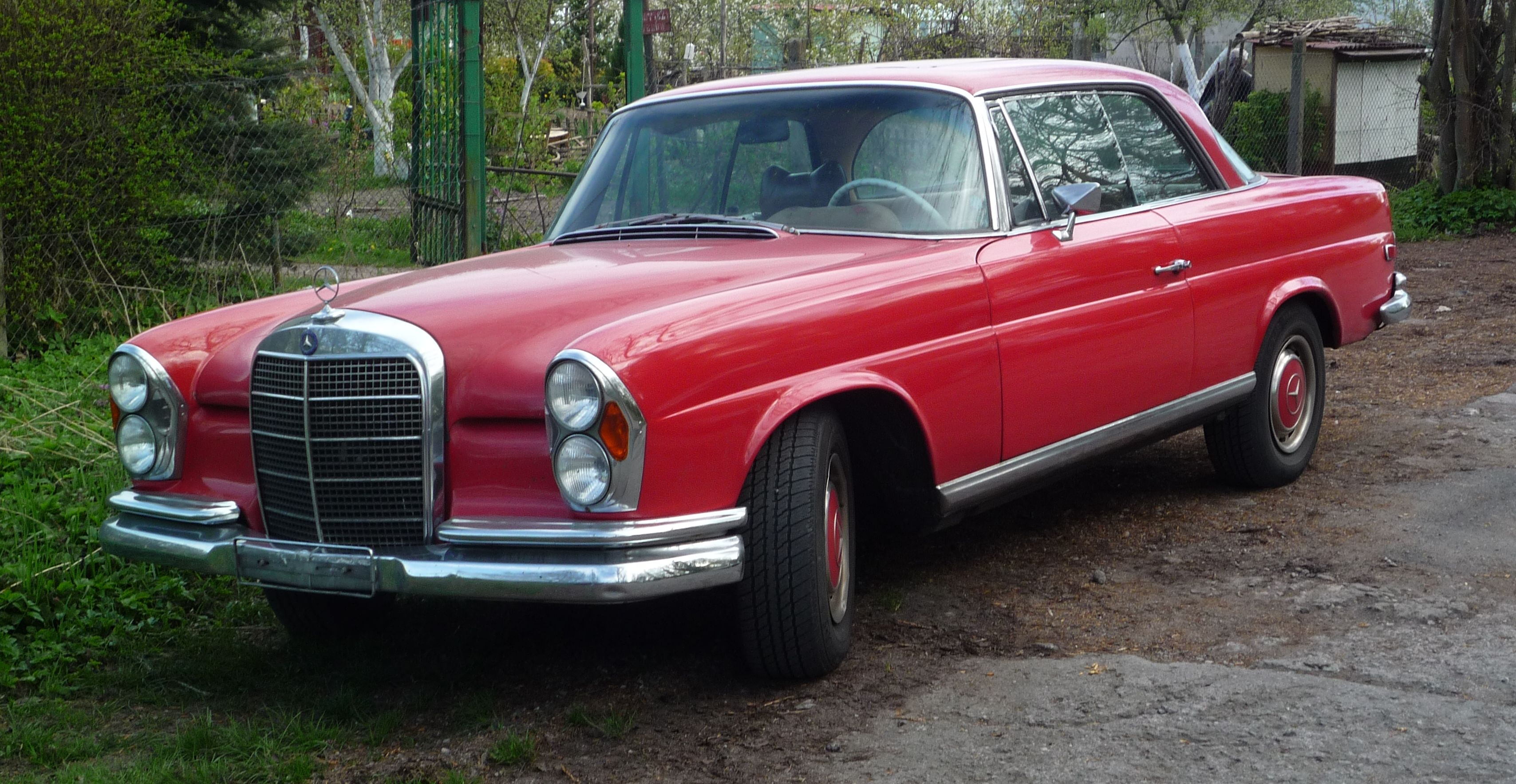 Mercedes-Benz W111C 280 SE w Słubicach.